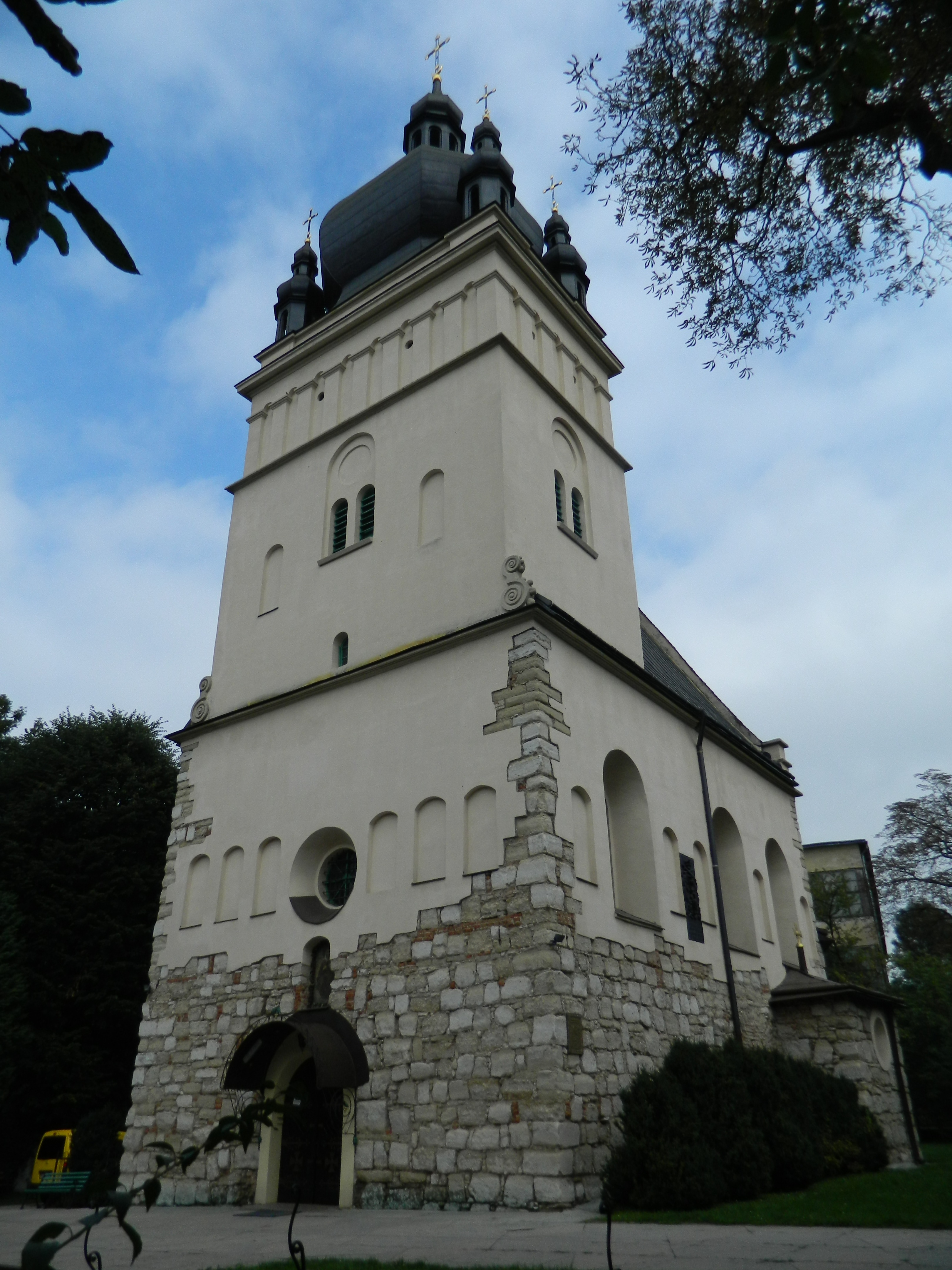 Церковь Святой Параскевы Пятницы (Львов)